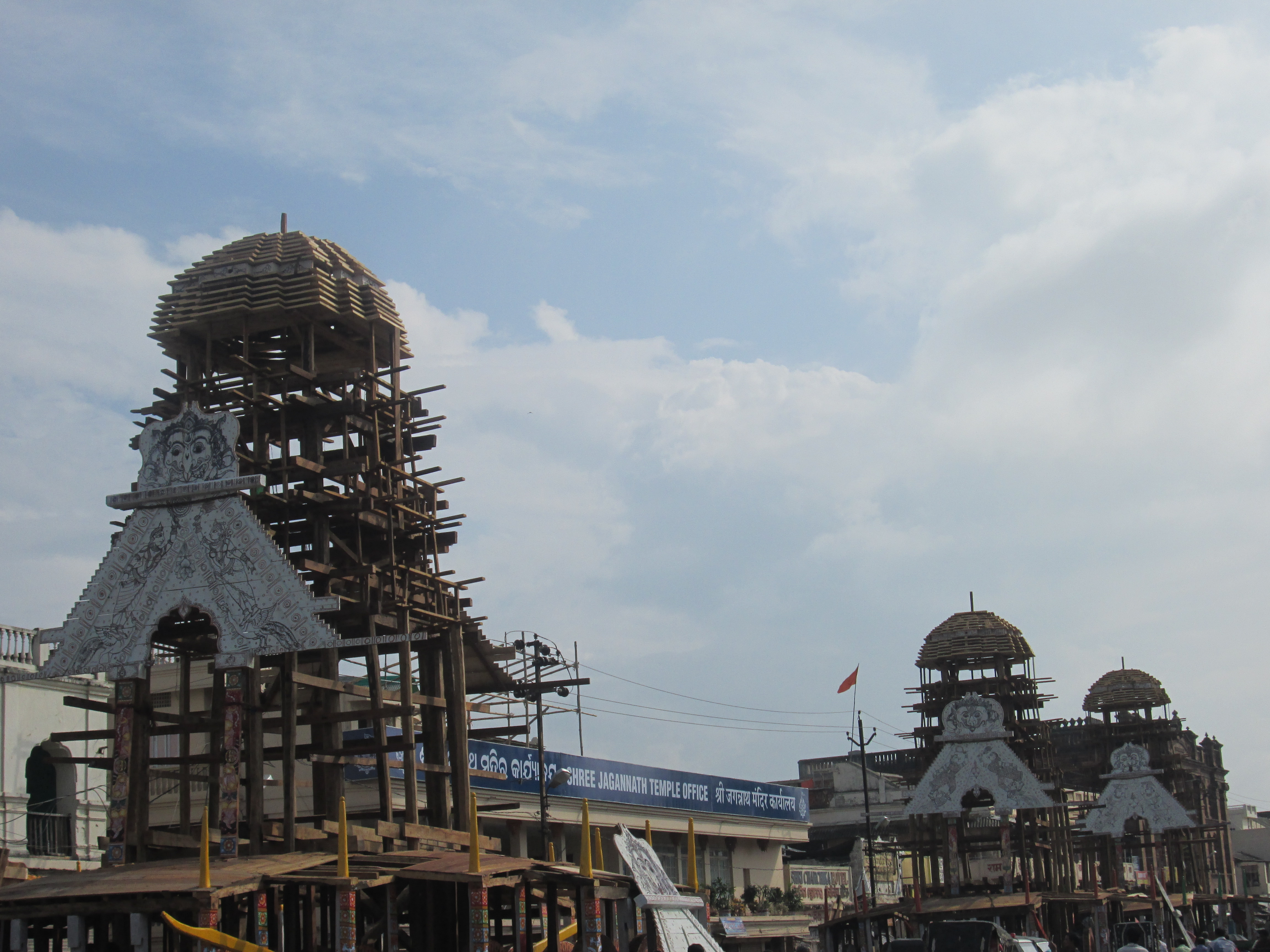 ଓଡ଼ିଆ: ରଥ ପ୍ରସ୍ତୁତି